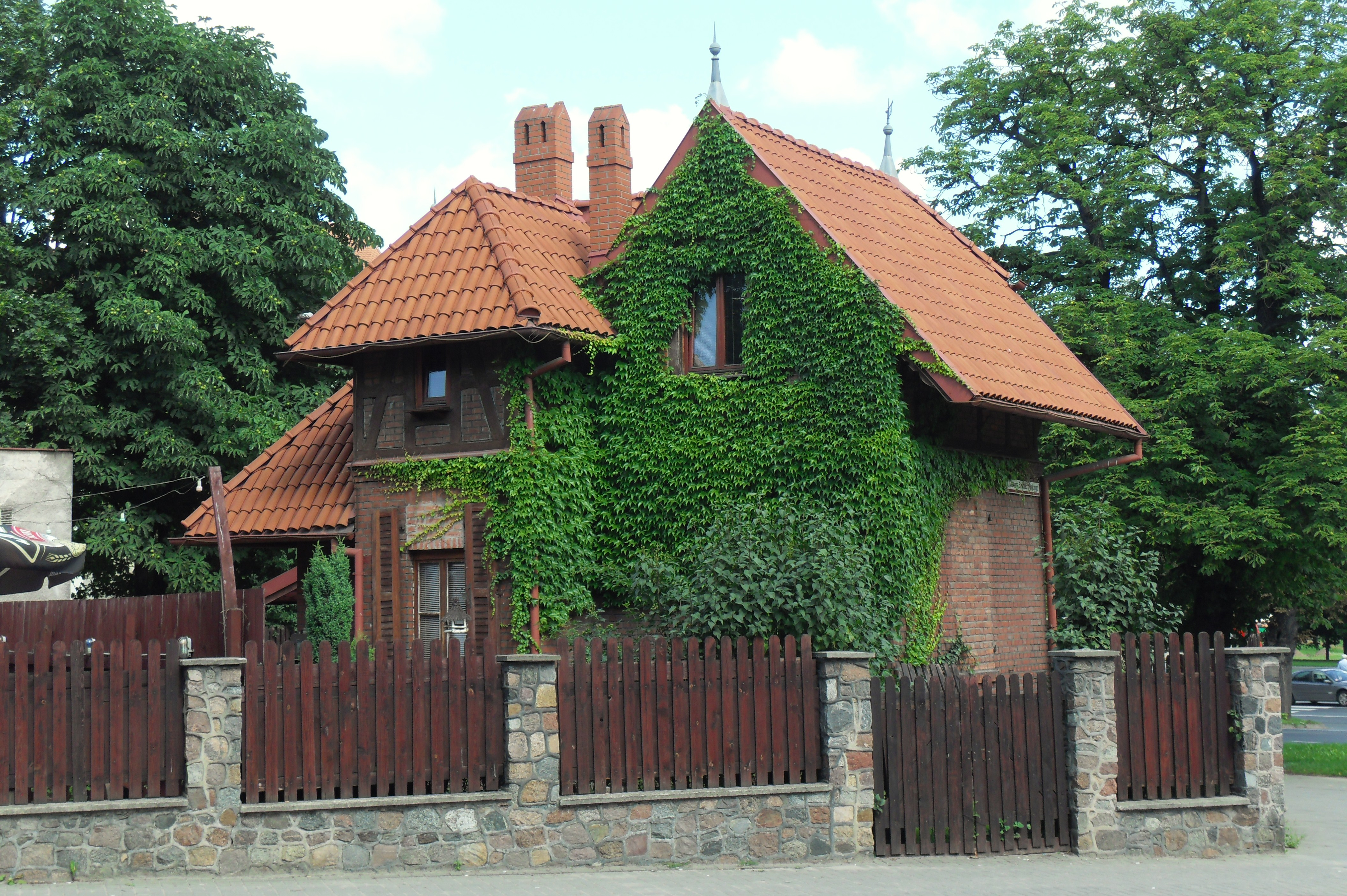 Gdańsk Aniołki, ulica Traugutta 1.